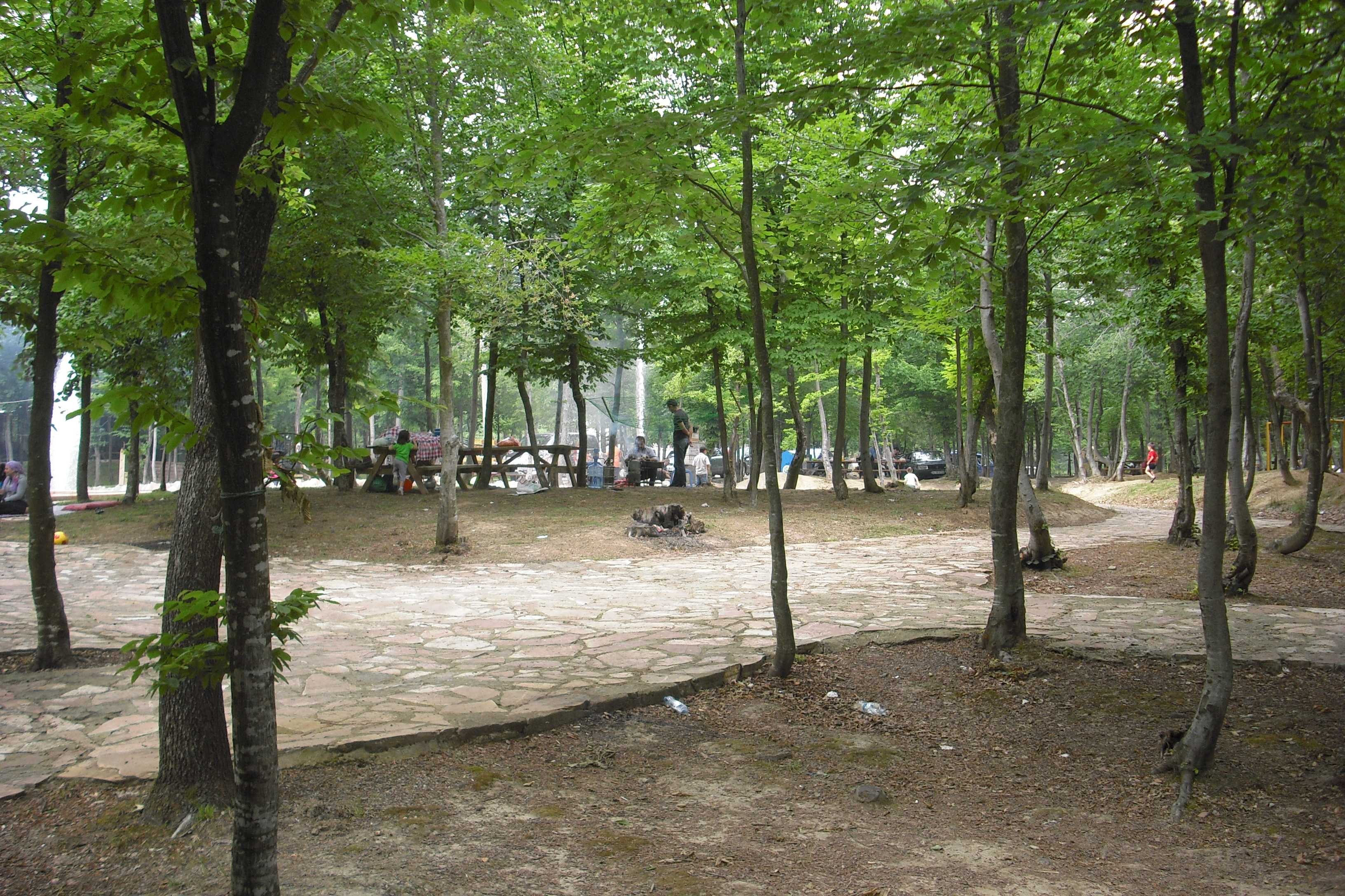 Salman Dede piknik alanı